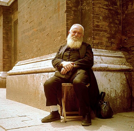 Olinto Marella